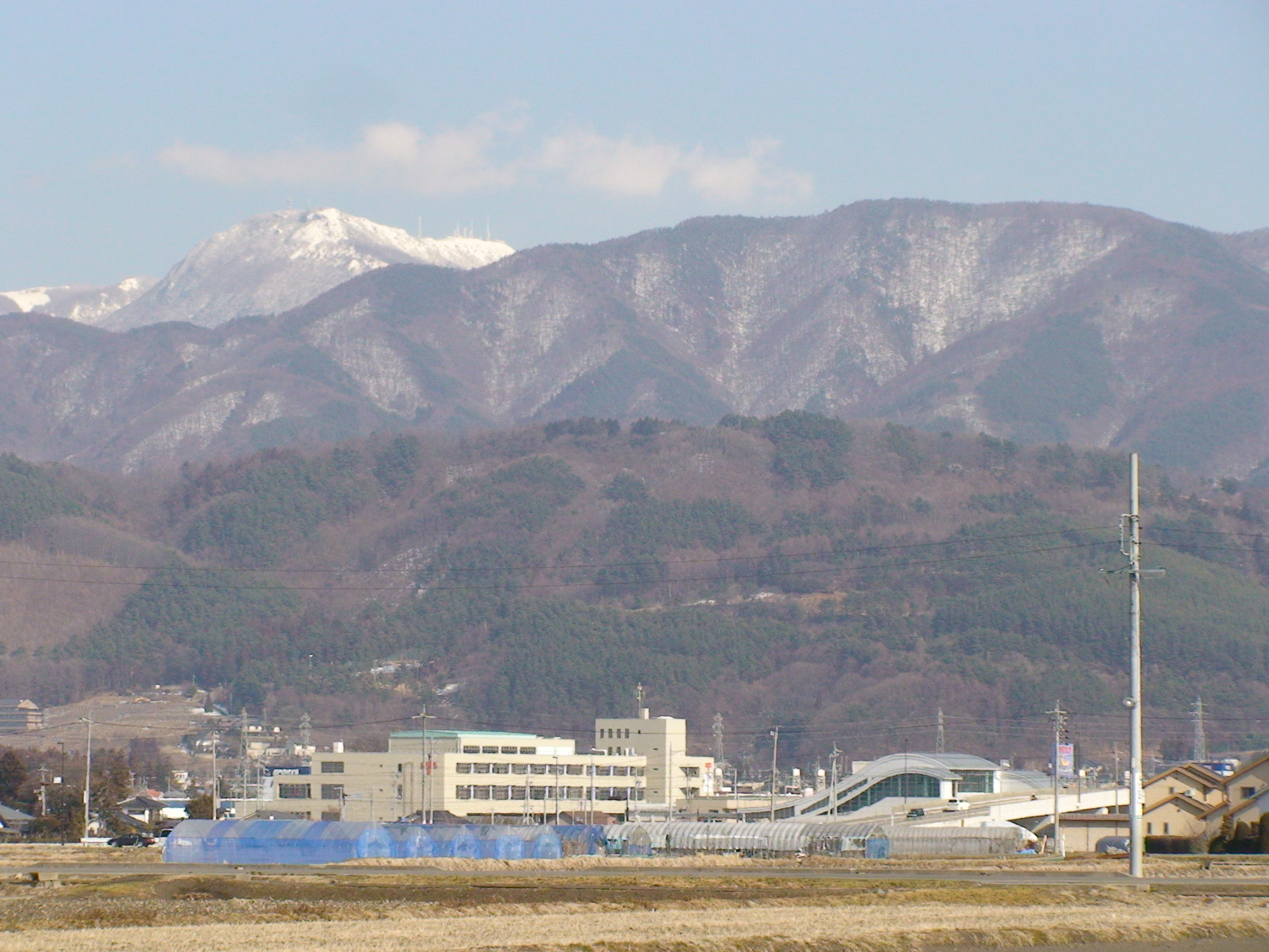 芳川から王が鼻(美ヶ原山頂)を望む